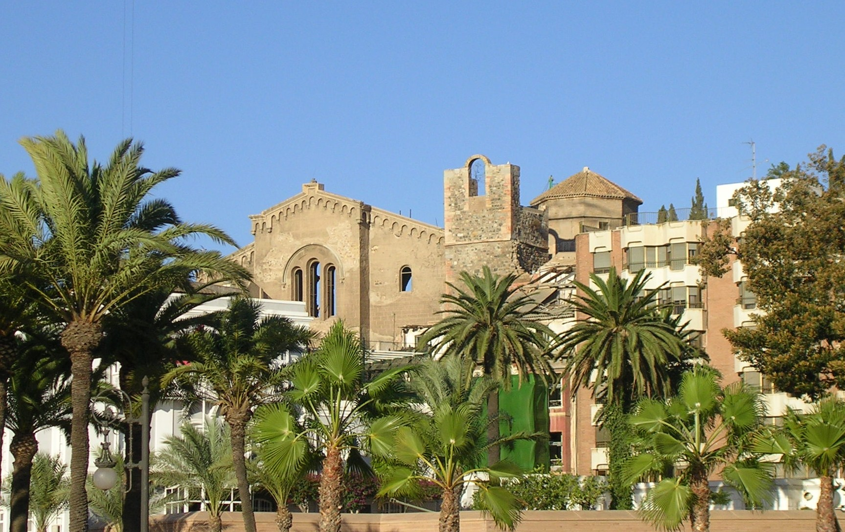 Vista de la Catedral de Cartagena (España)